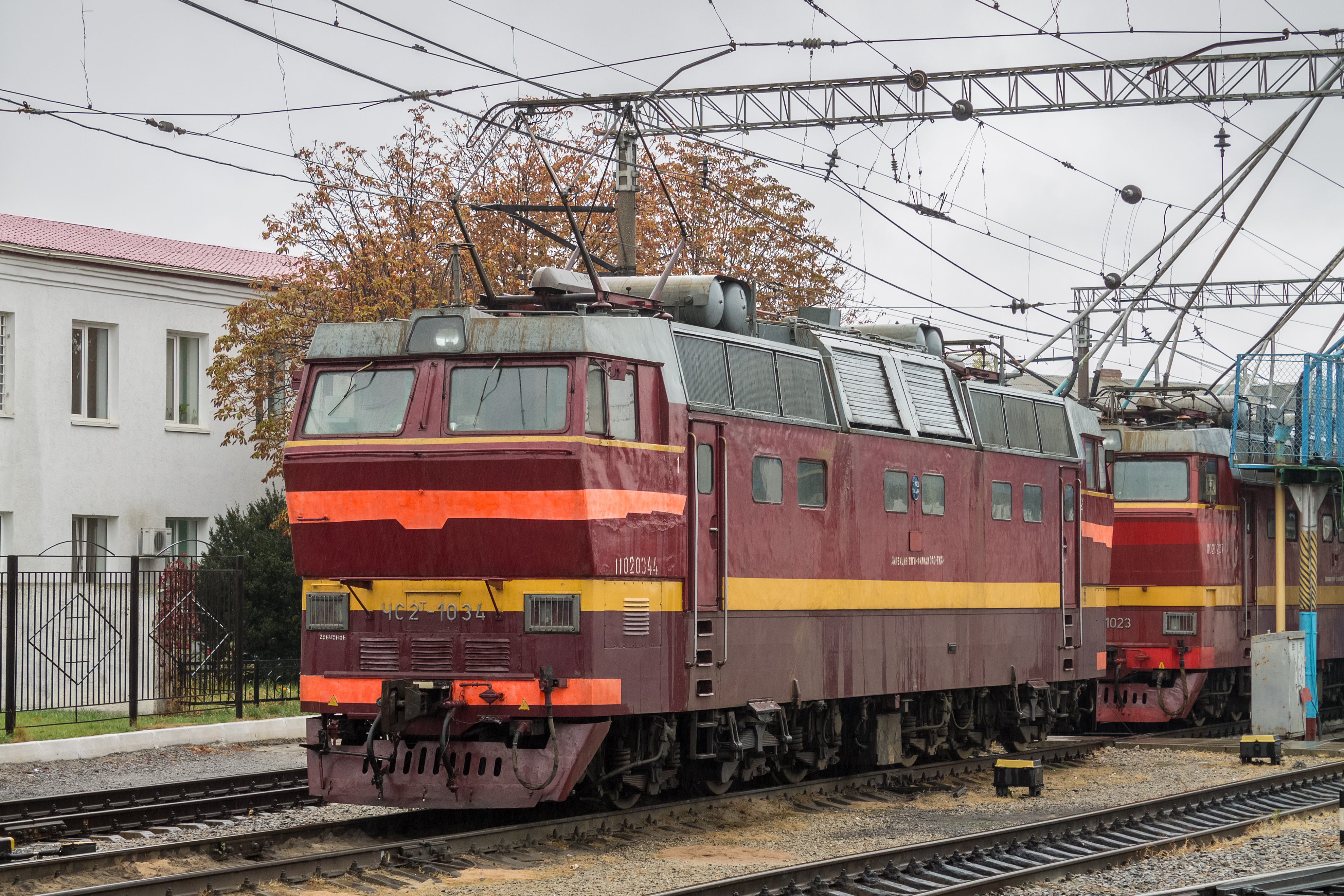 ЧС2Т-1034, станция Симферополь см. фото 700679 в альбоме автора